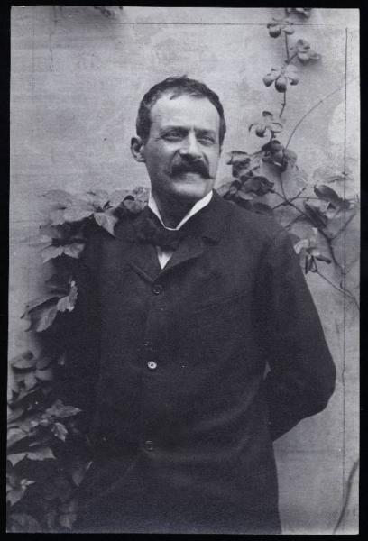 Ritratto dell'attore e drammaturgo Gaetano Sbodio